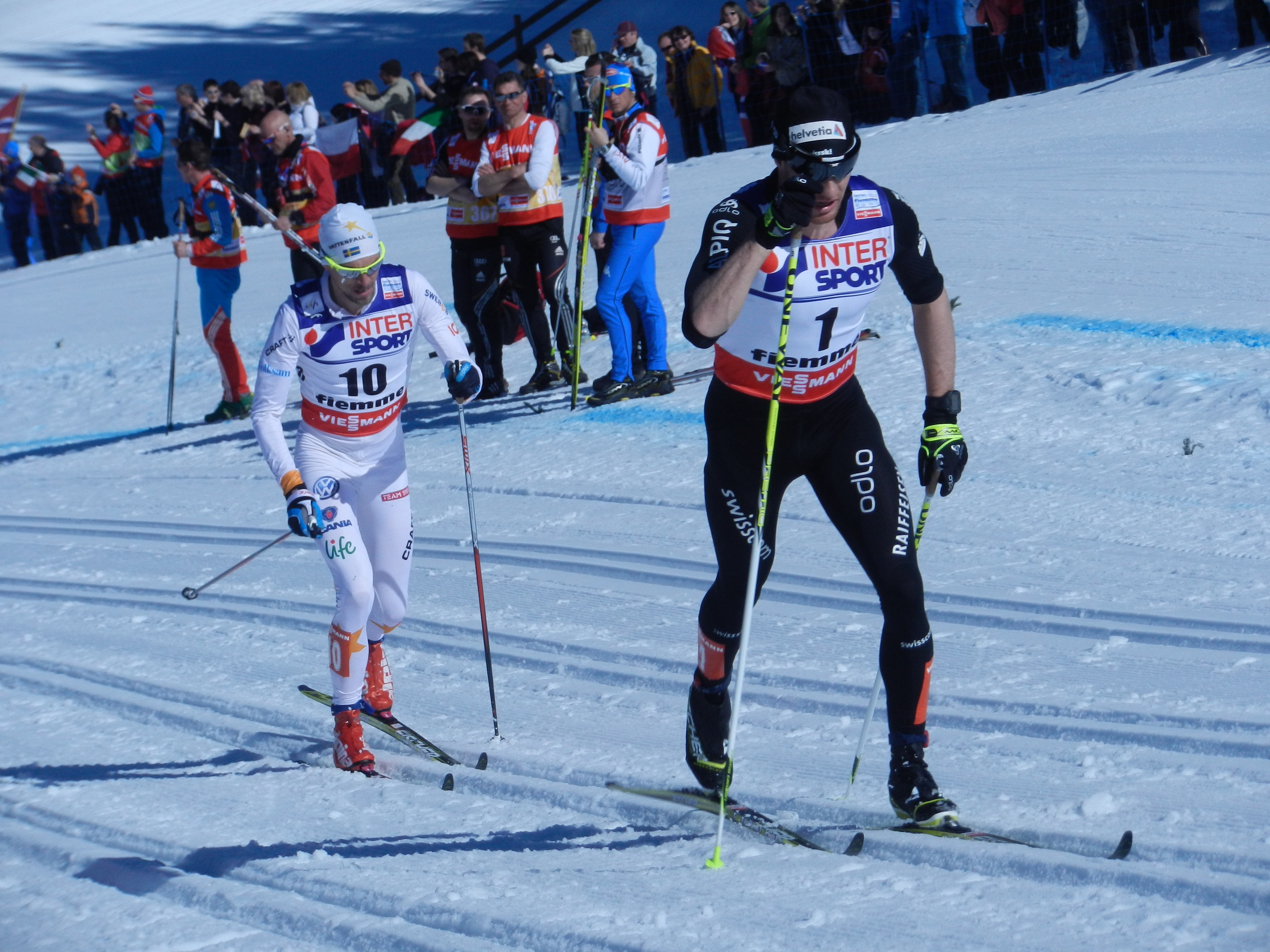 Dario Cologna ,un mito,seguito da Johan Olsson